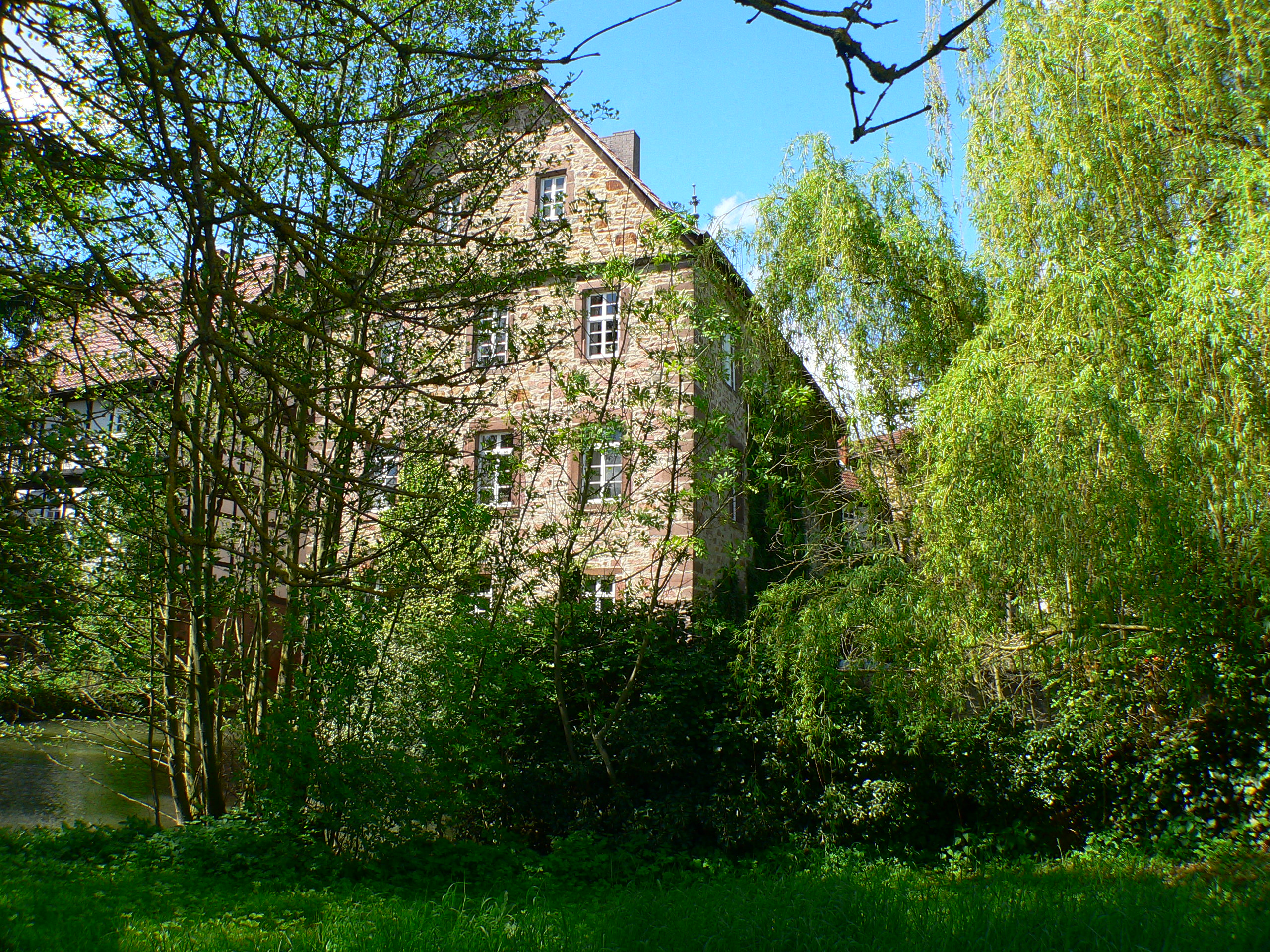 Schloss Nassenerfurth (Baumbachsches Schloss) in Borken-Nassenerfurth, Schwalm-Eder-Kreis, Regierungsbezirk Kassel, Hessen; Südansicht